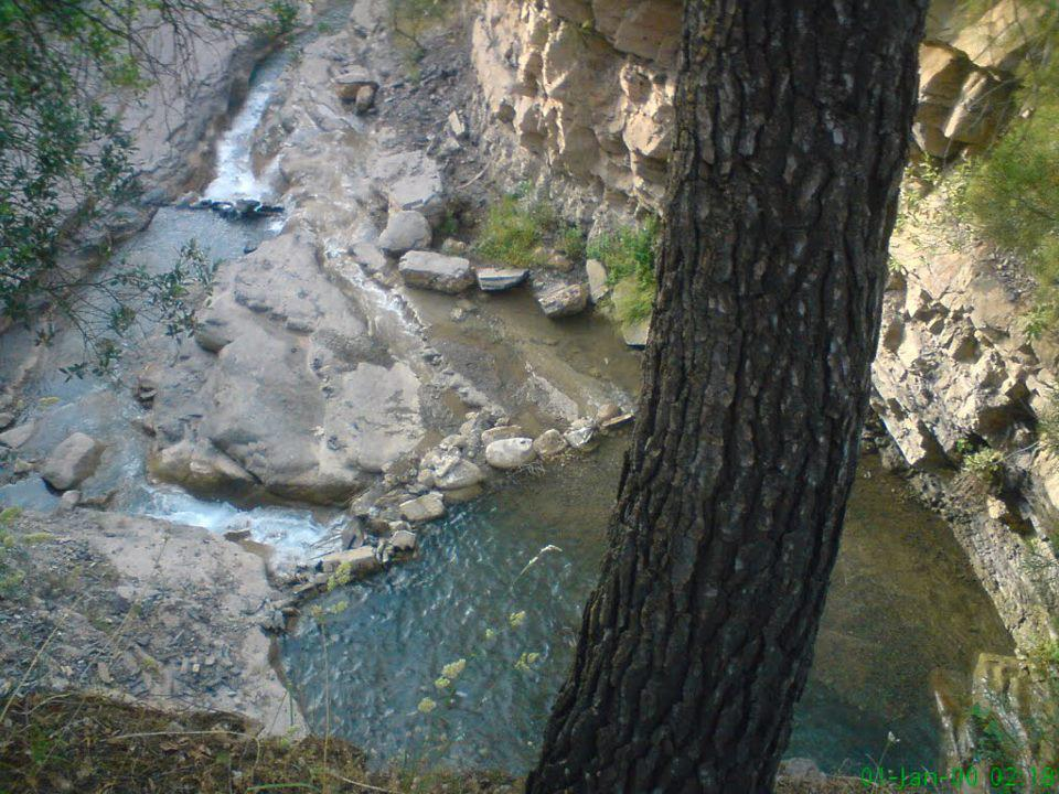 شلال تسوري بن تسوري عين الرمانة البليدة